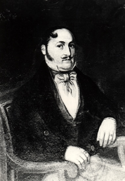 Friedrich Knie ist der Begründer der Circus Dynastie Knie